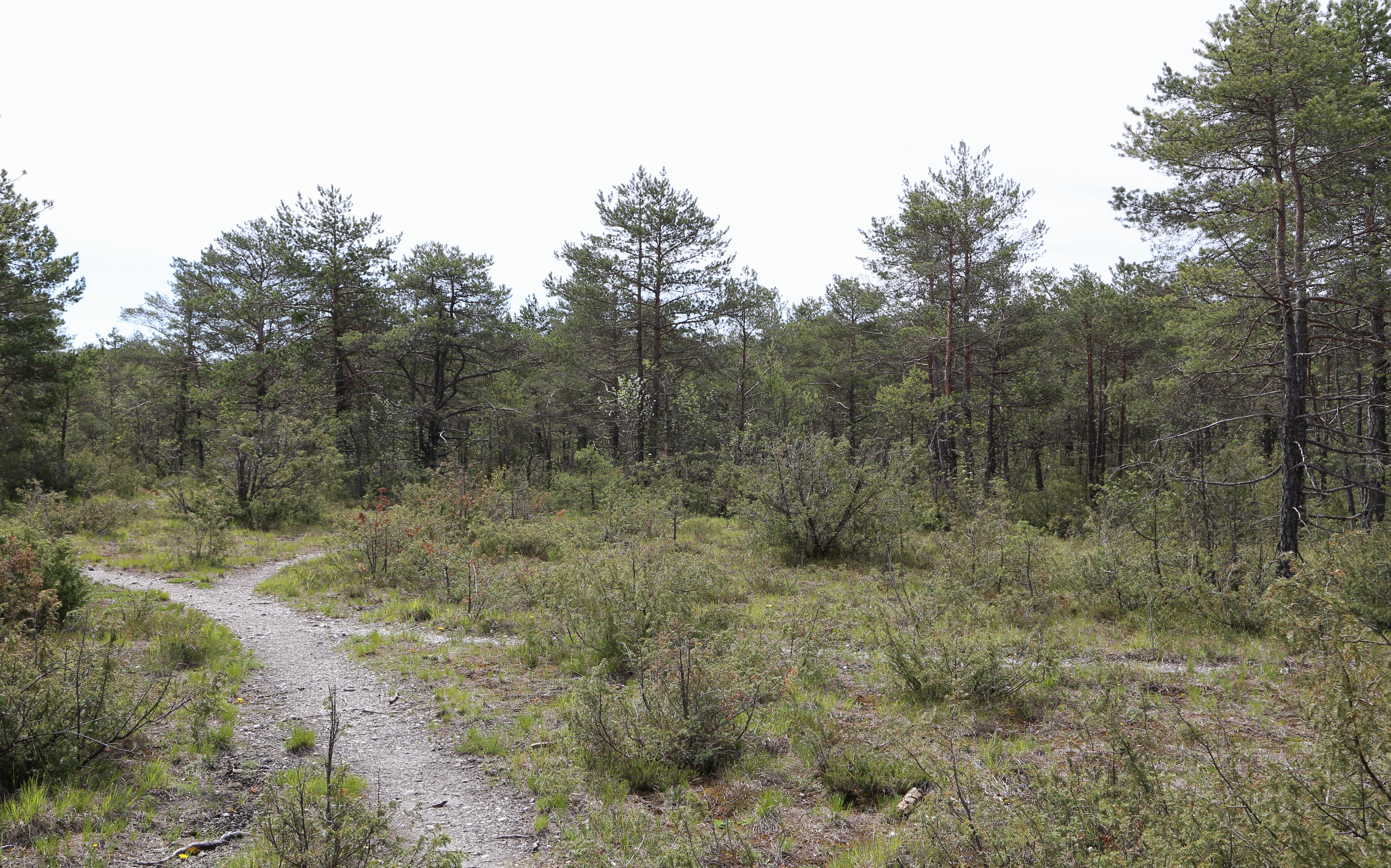 Auwald in der Pupplinger Au; östliches Isarufer, westlich St2073, zwischen Ascholding und Puppling; Naturschutzgebiet Isarauen zwischen Schäftlarn und Bad Tölz (NSG-00267.01)